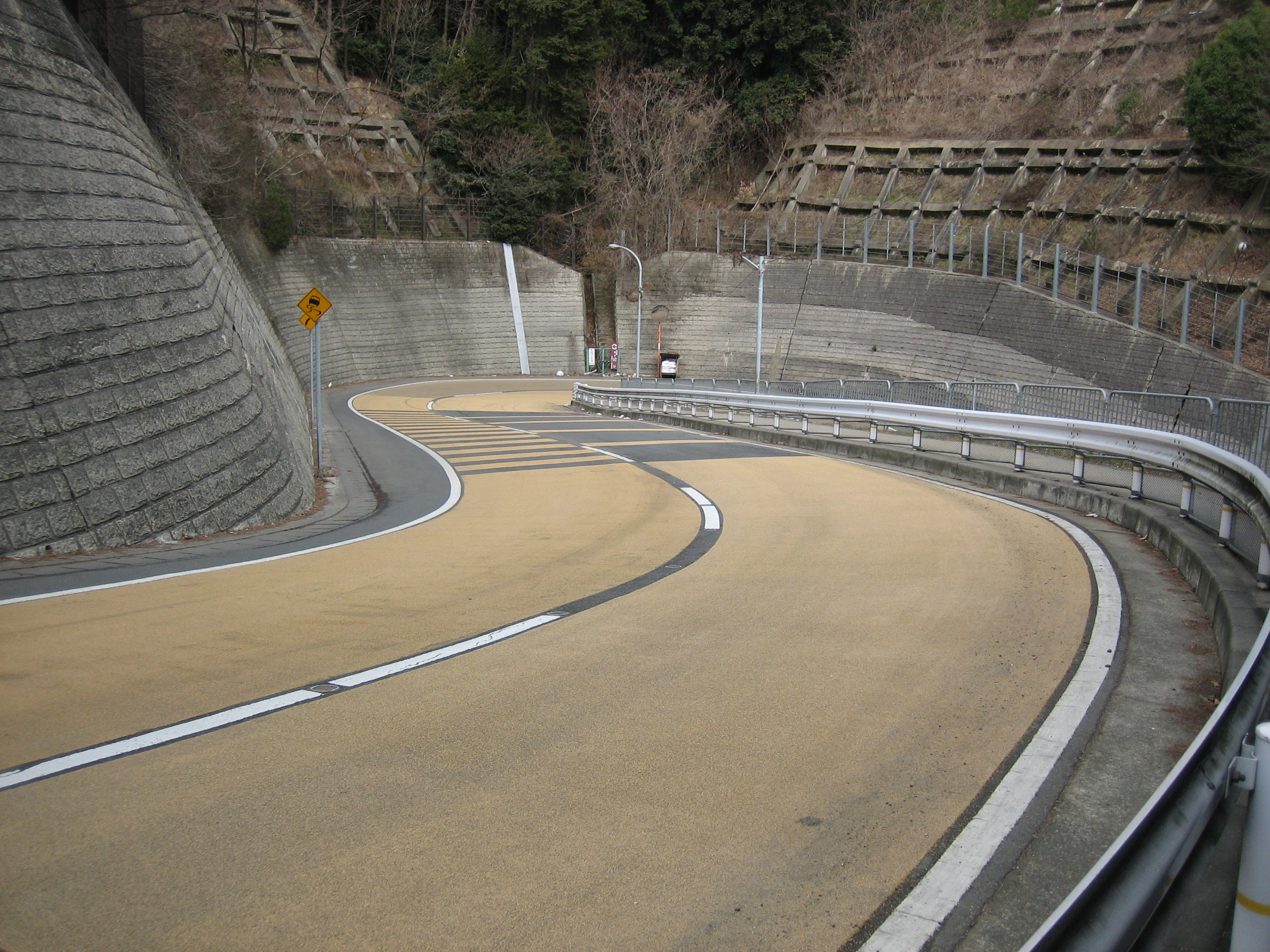 京都市北区大北山原谷乾町から市道衣笠緯40号線（氷室道）を撮影